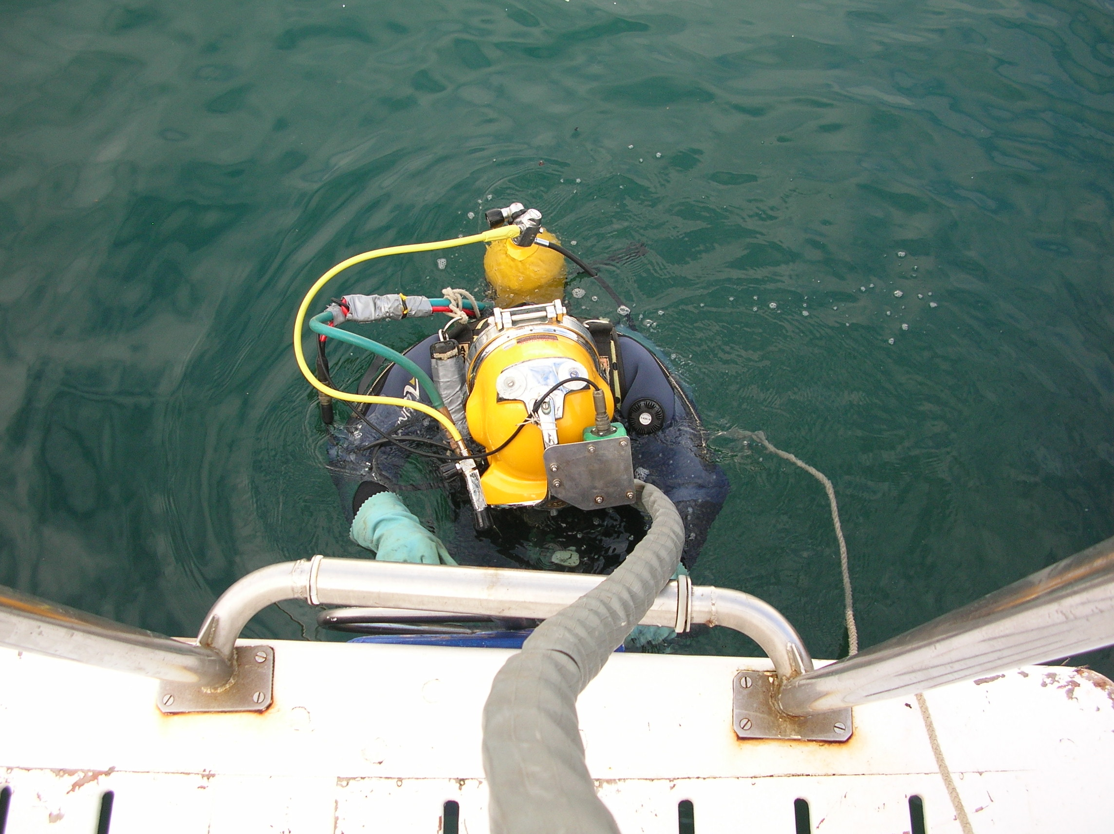 Photo prise pendant un stage de qualification spécifique « plongée de bord » dispensée par l'institut national de plongée professionnelle de Marseille.